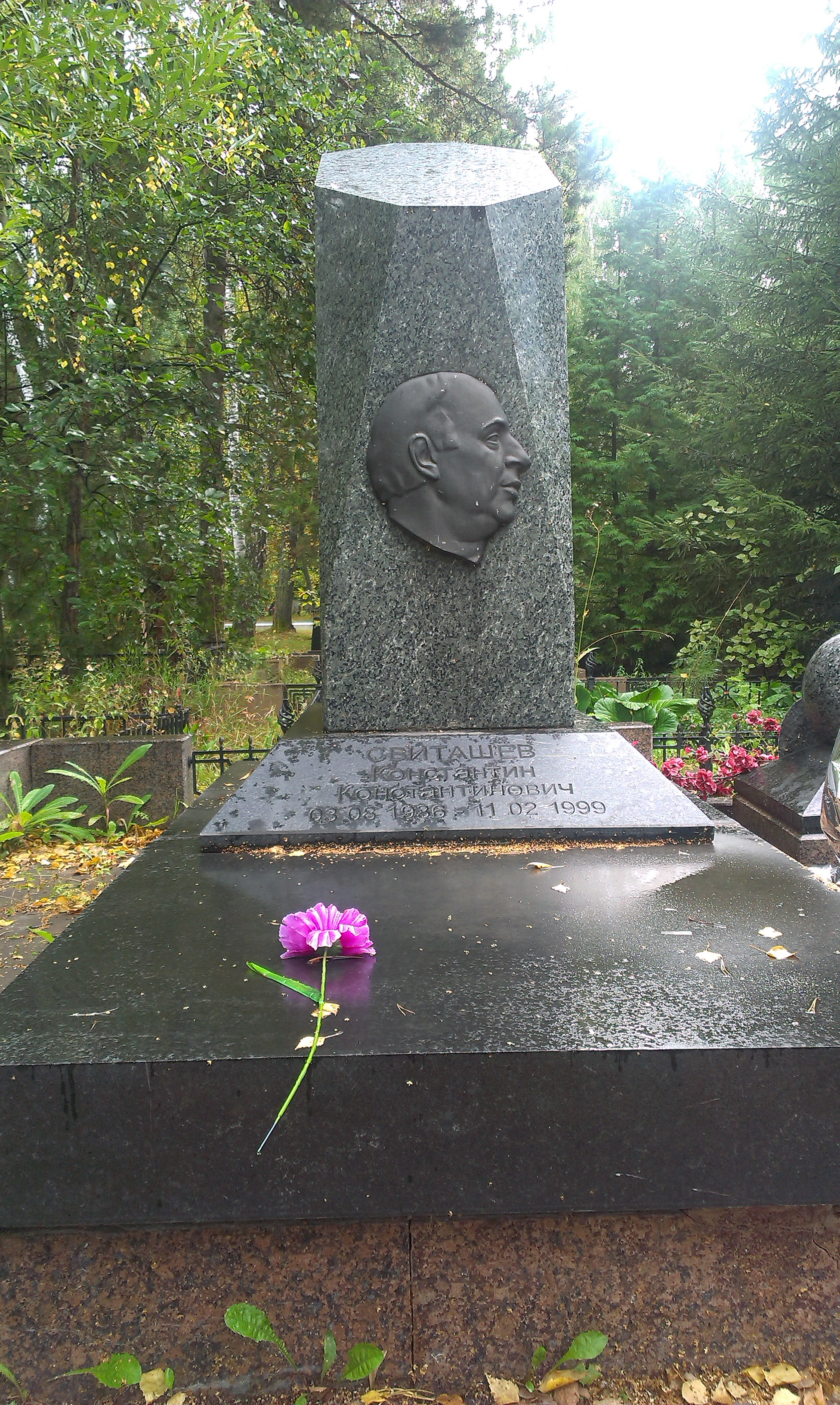 Южное (Чербузинское) кладбище